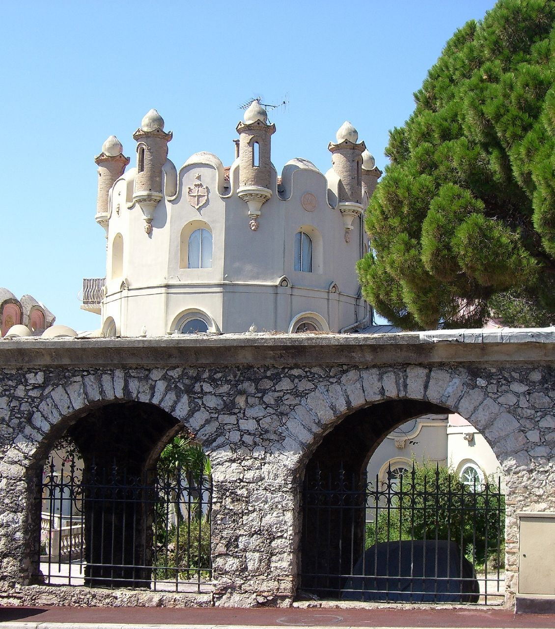 Détails du château de l'anglais sur la colline du mont Boron à Nice.